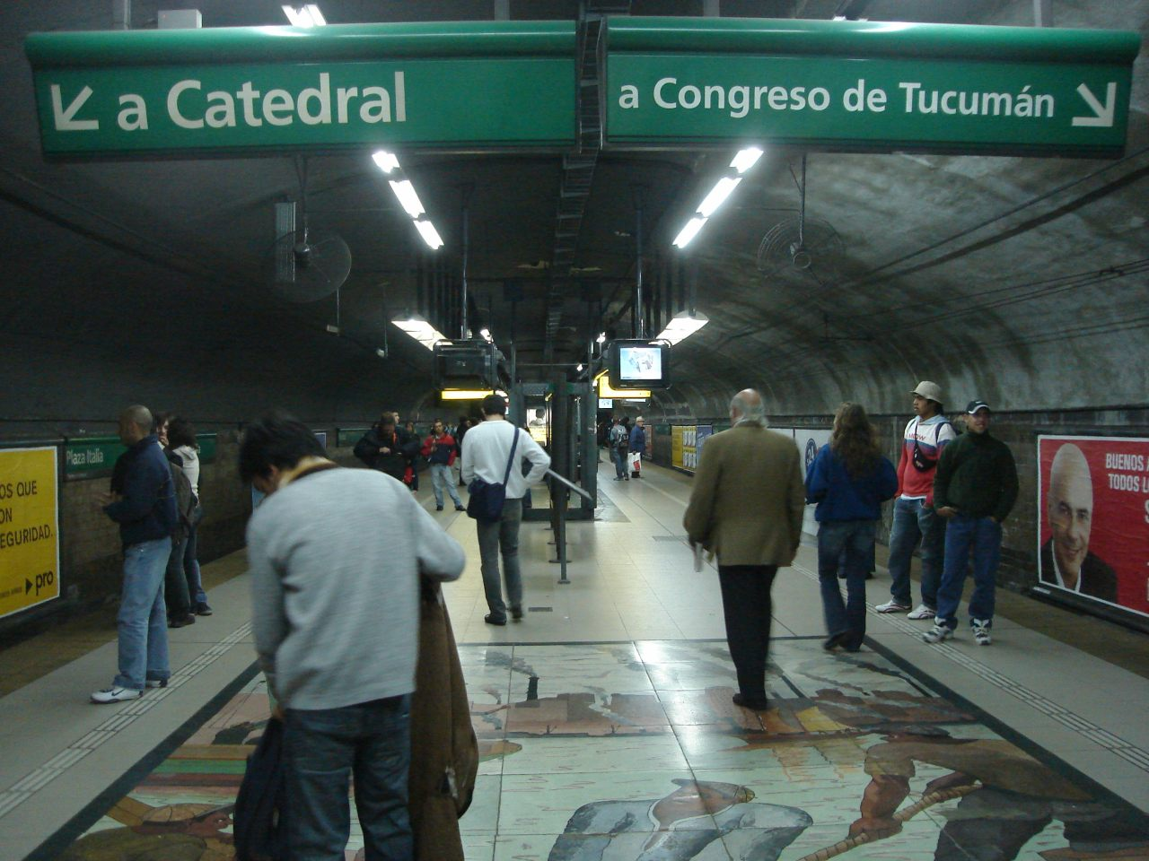 Vista del andén de la estación Plaza Italia de la línea D del subterráneo porteño.